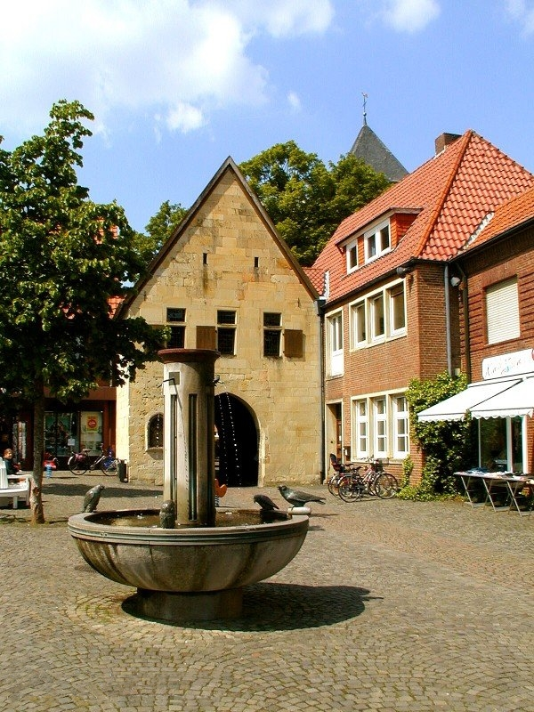 Havixbecker Torbogen - ein Wahrzeichen der Gemeinde Havixbeck